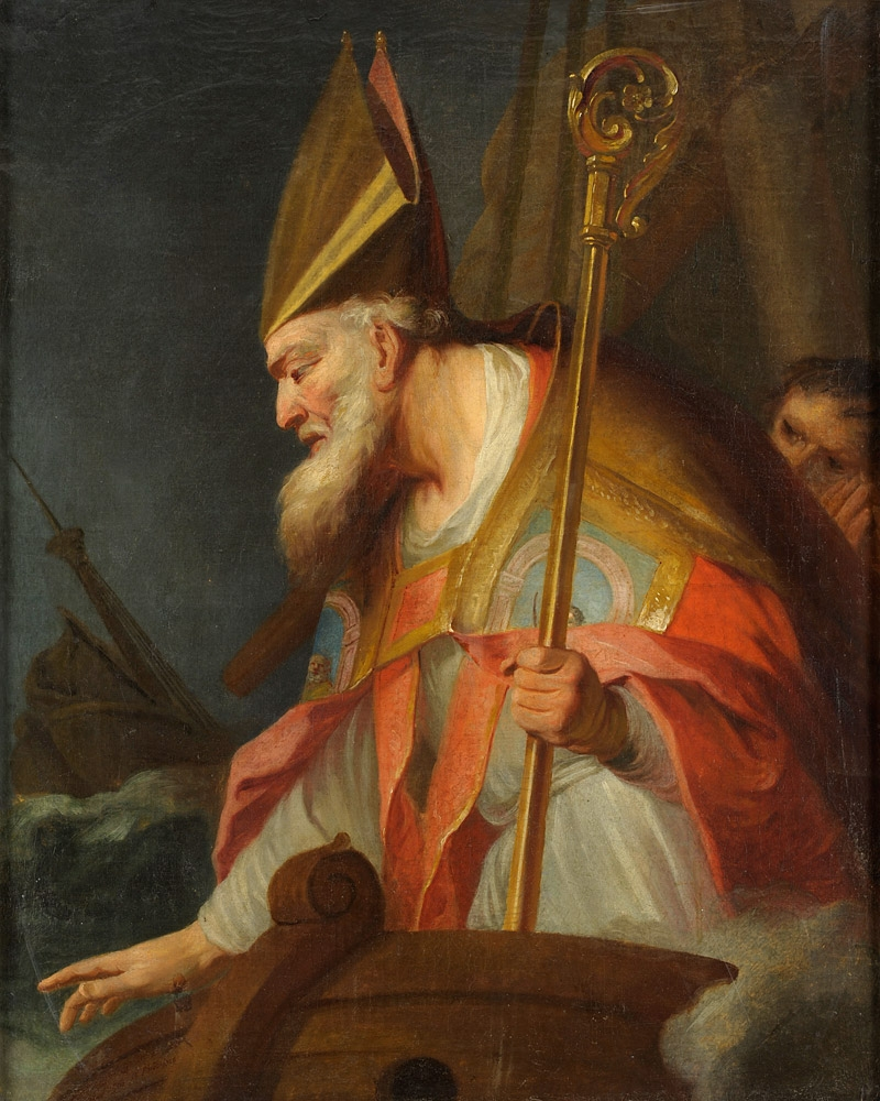 Der Heilige Nikolaus von Myra. Schutzpatron der Seefahrer. Signiert. Datiert 1736. Öl/Lwd./doubl., 82 x 66 cm